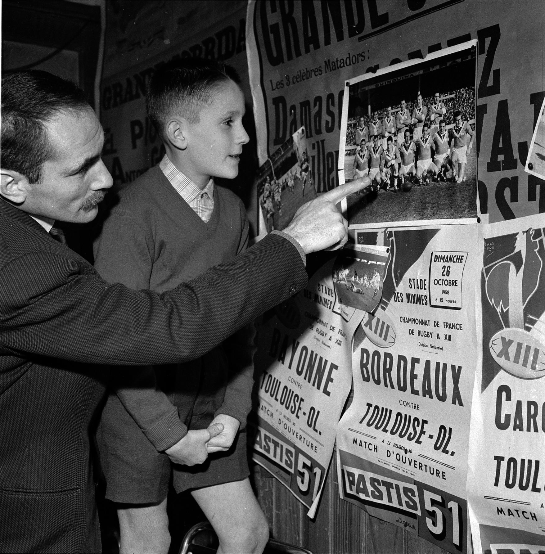 Novembre 1958. Vincent Cantoni, ancien joueur et entraîneur de l'équipe toulousaine de rugby à XIII (Toulouse Olympique XIII) montre à son fils Jack une photo de l'équipe toulousaine (plan rapproché, vue de profil).